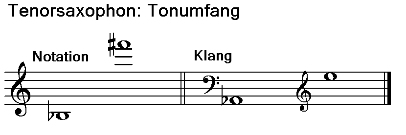 Notierter und klingender Tonumfang beim Tenorsaxophon